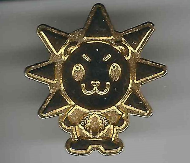 堀越高等学校で配布されているピンバッジ